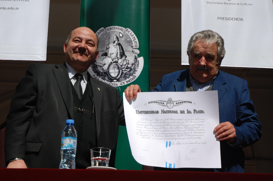 El Presidente de Uruguay, José Mujica, recibe el título de Doctor Honoris Causa de manos de Fernando Tauber, Presidente de la Universidad Nacional de La Plata, Argentina.